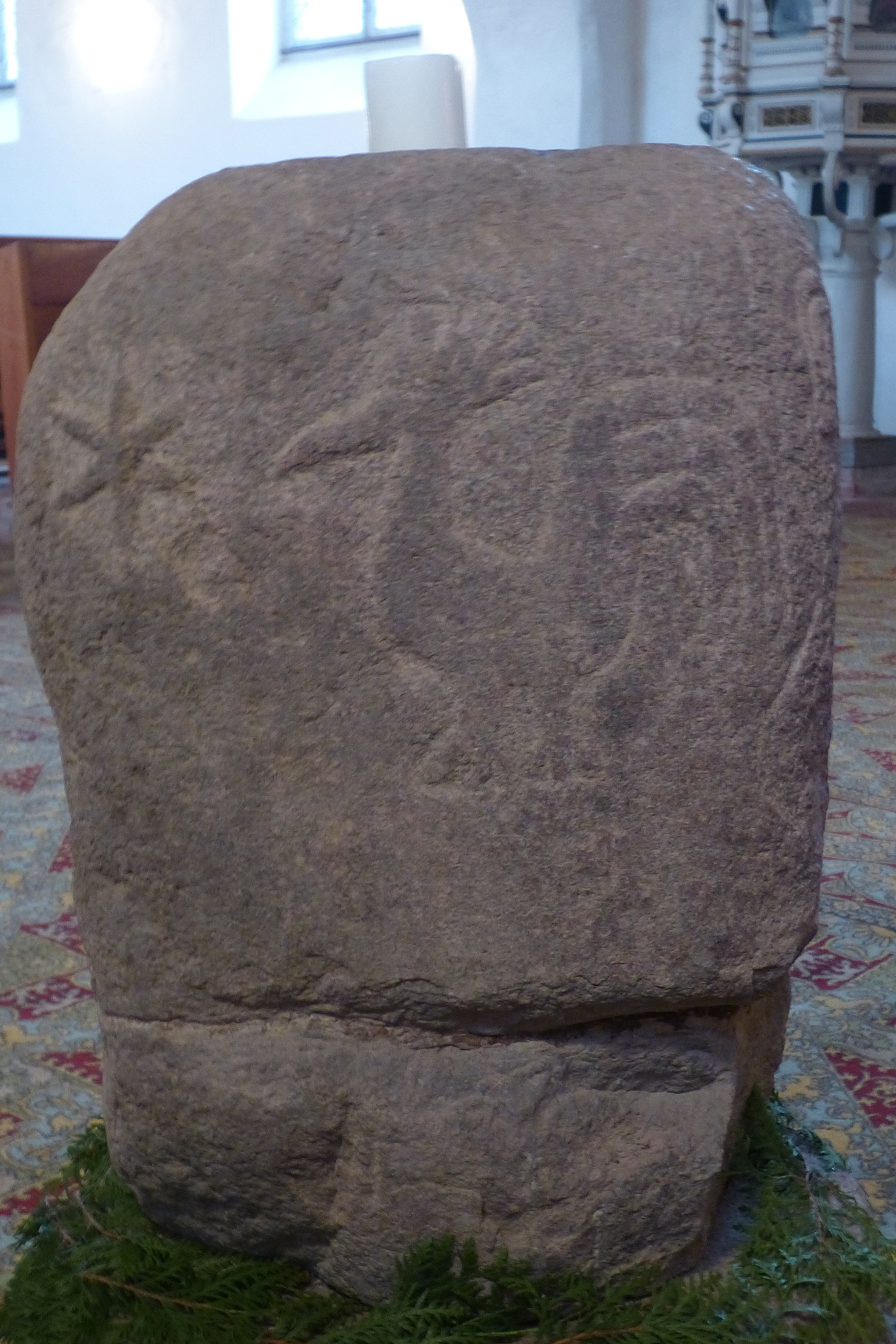 Rückseite des Taufsteins in der Kirche in Krien